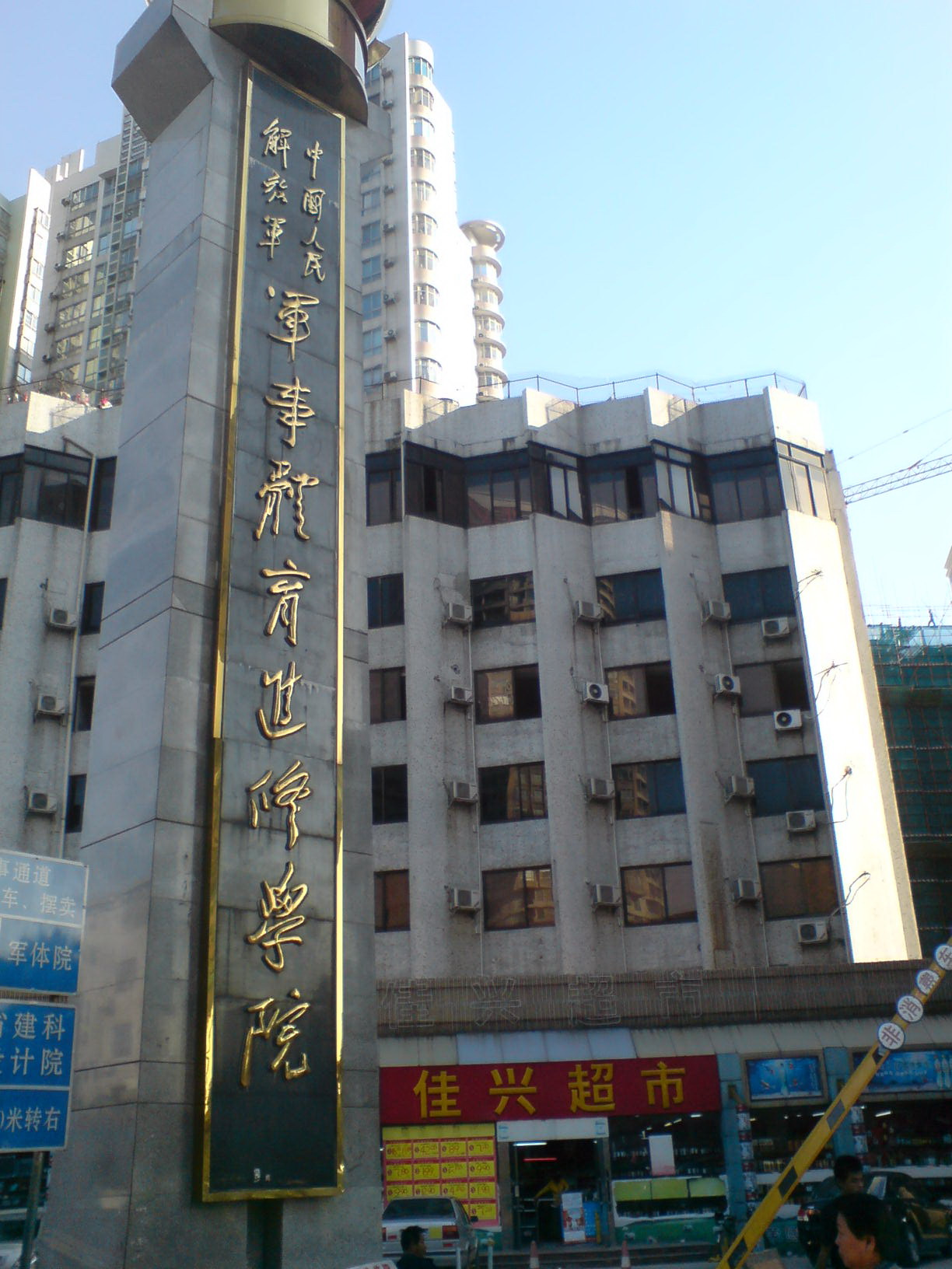 广州军体院，全名为中国人民解放军军事体育进修学院。